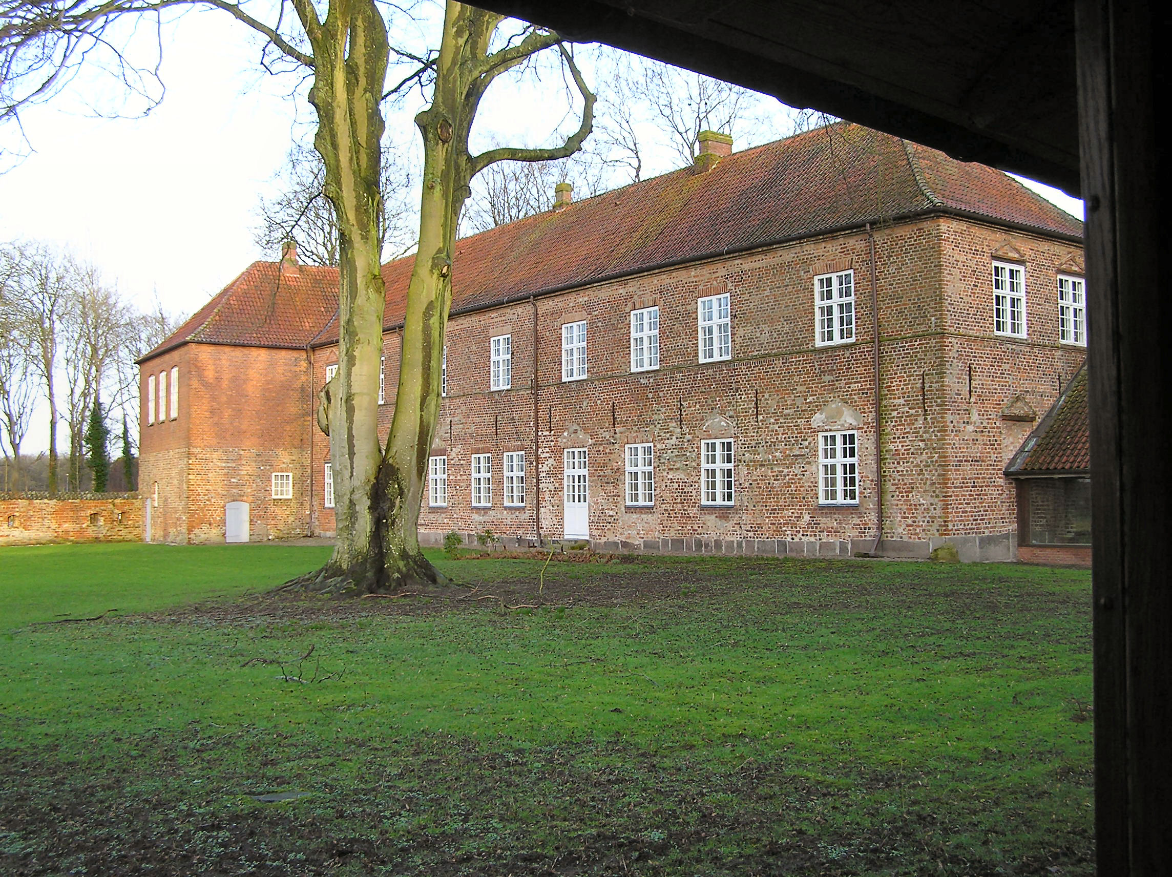 Løgumkloster, Slottet, hjemsted for Præstehøjskolen